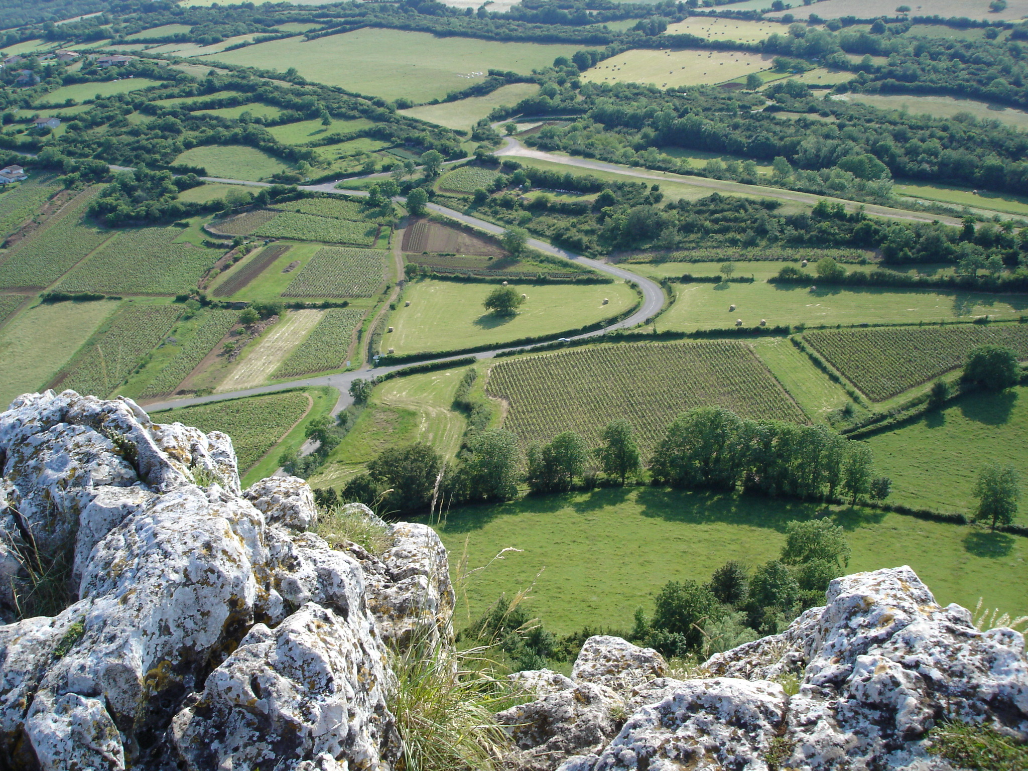 La campagne près du village de Solutré, vue depuis la roche de Solutré -- Photo amateur prise par moi-même